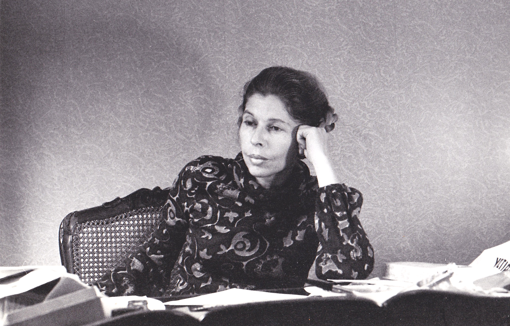 Claudine Herrmann à son bureau circa 1980